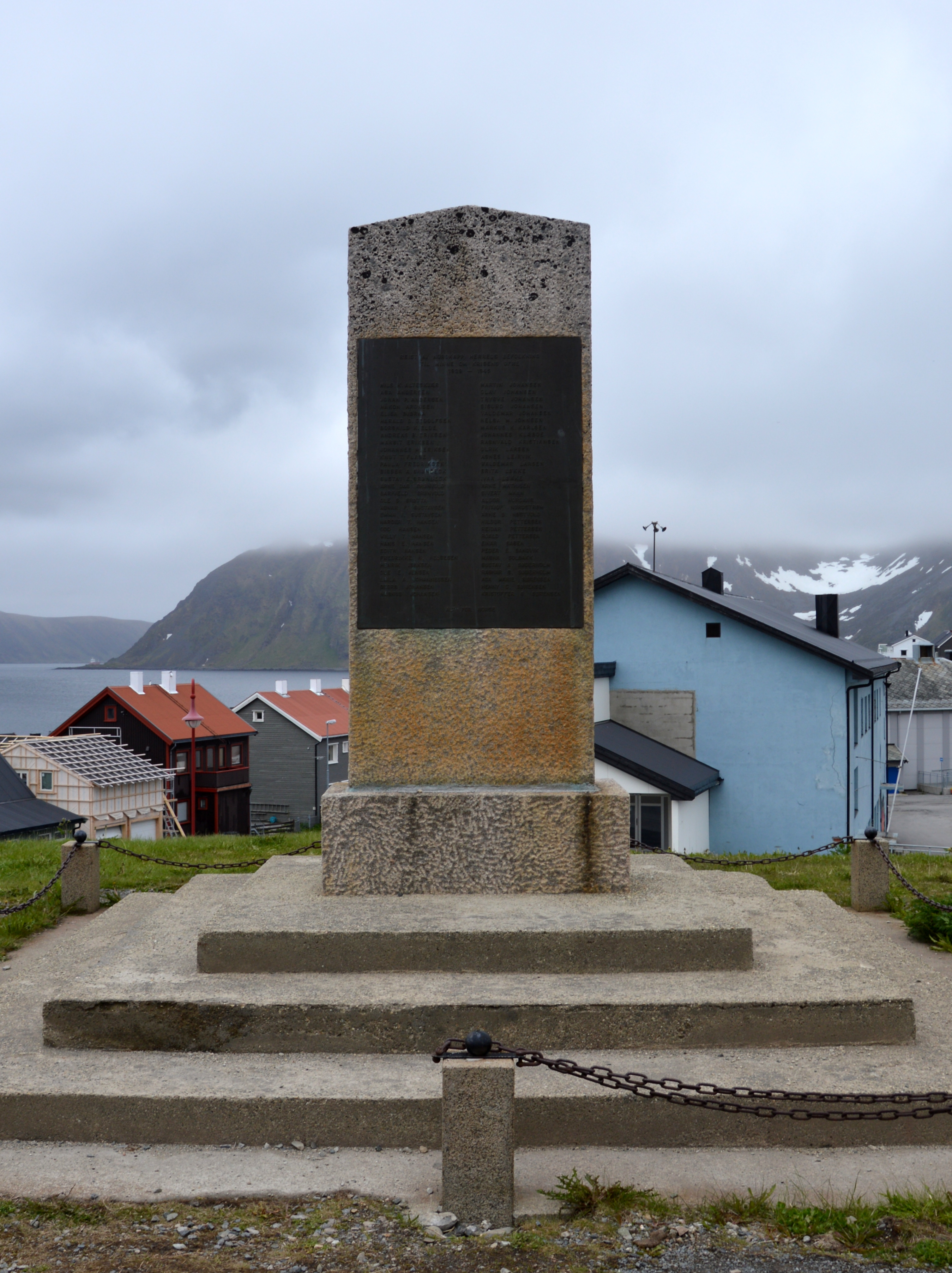 Bautastein in Honningsvag